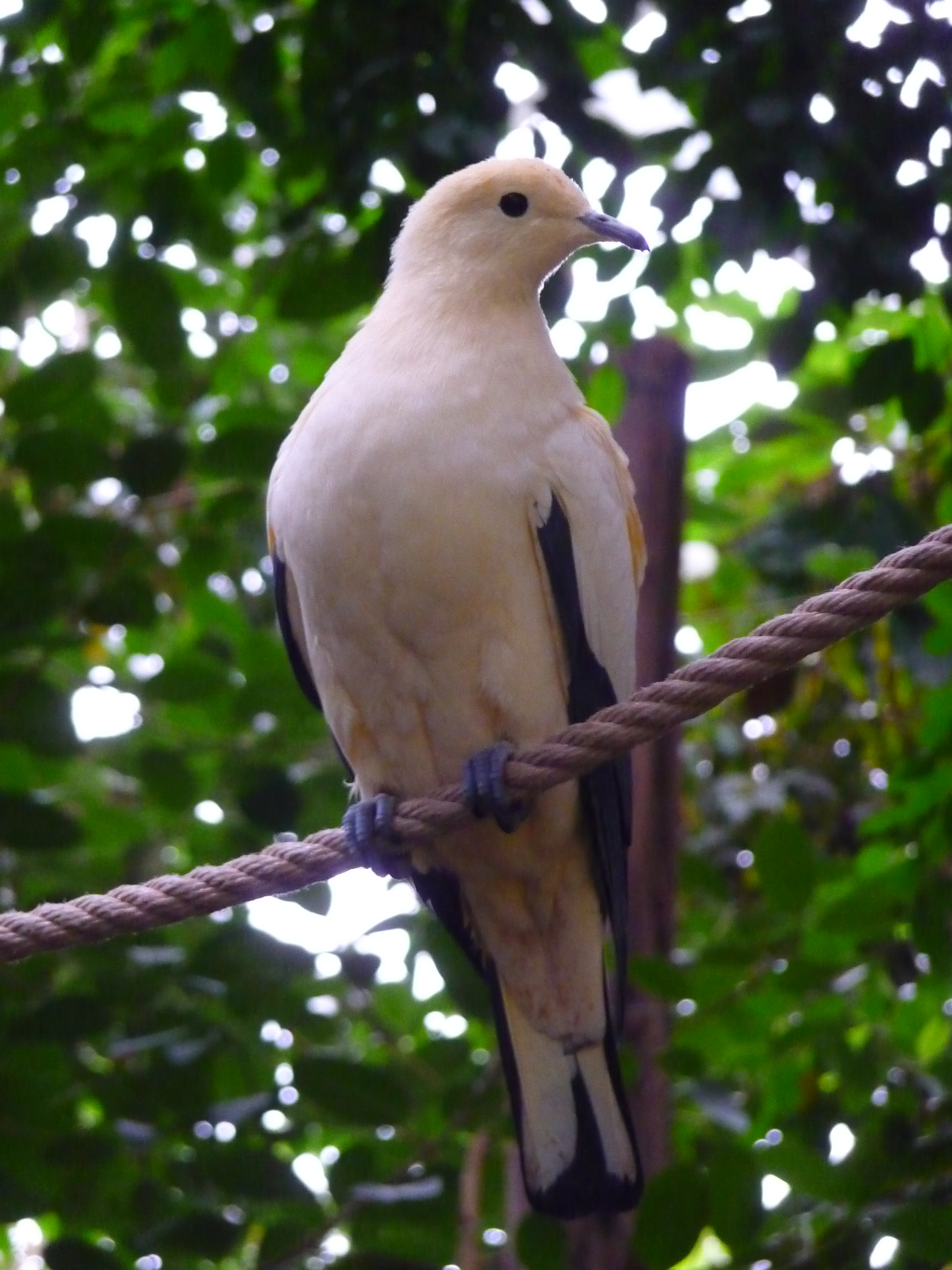 Zweifarben-Fruchttaube (Ducula bicolor)